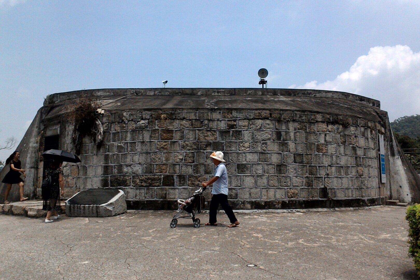 胡里山炮台西炮台,福建省廈門市思明區濱海街道白城社區